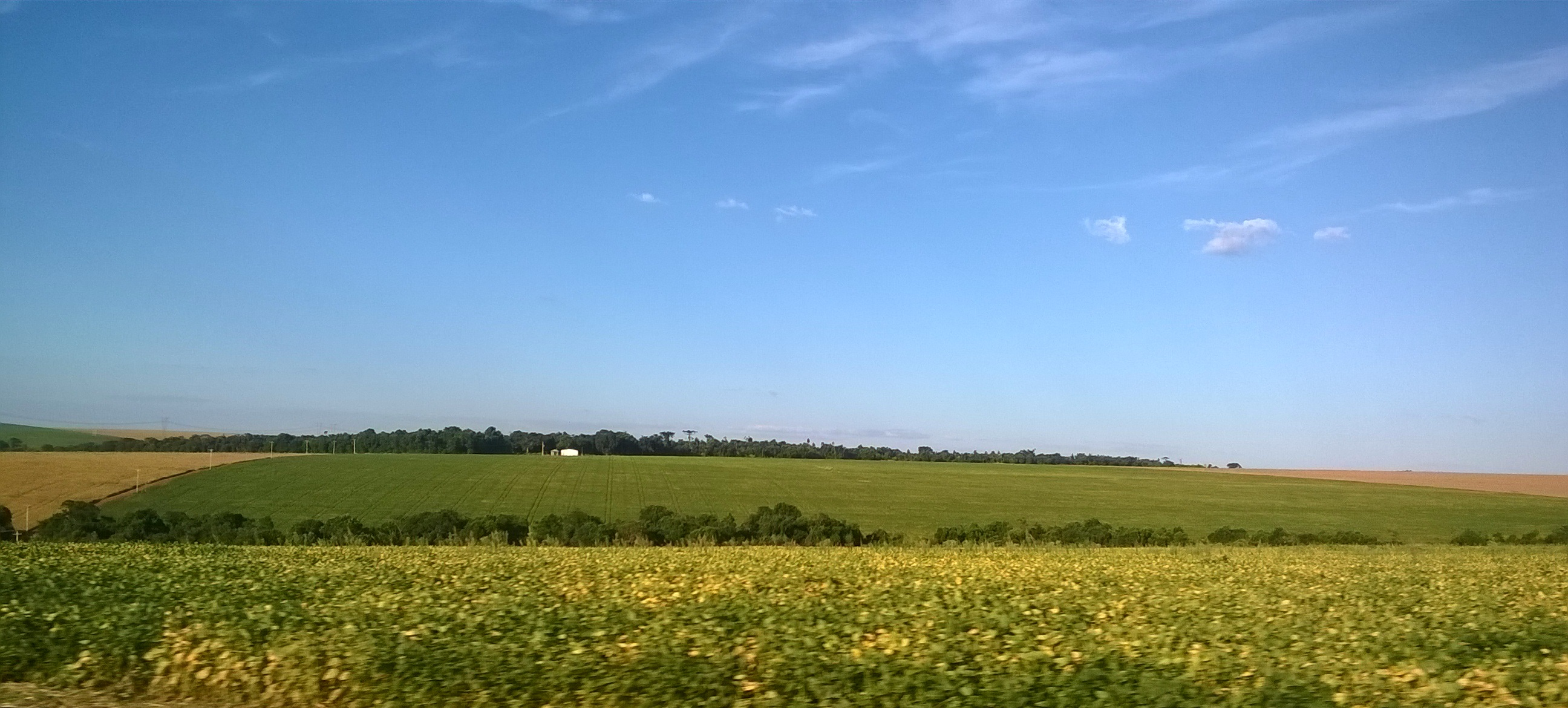 Cascavel - State of Paraná, Brazil